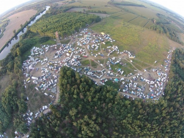 Summer Free Party Italy